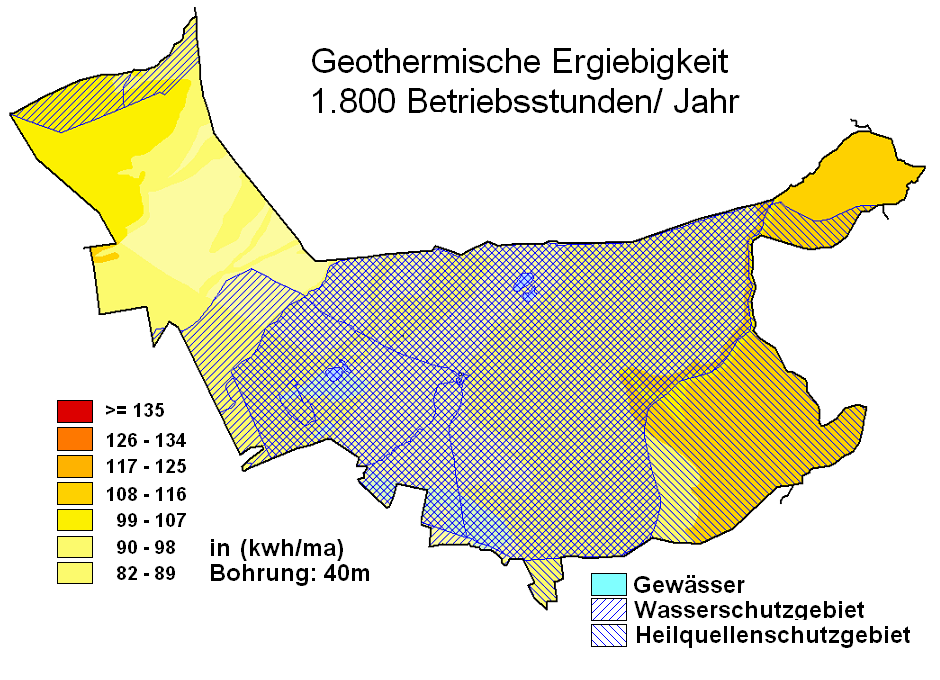 geothermische Karte Bad Lippspringe